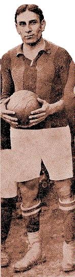 Zenón Díaz